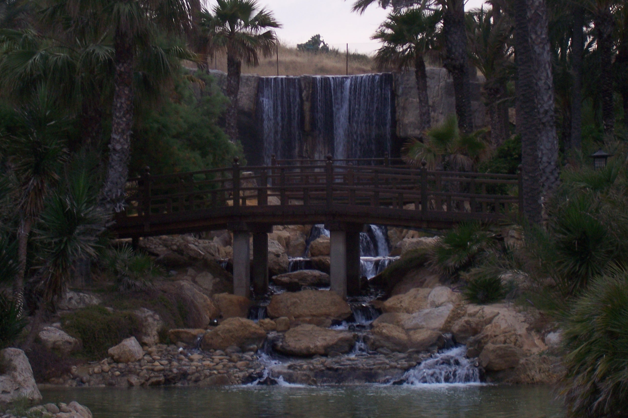 foto de la cascada del parque